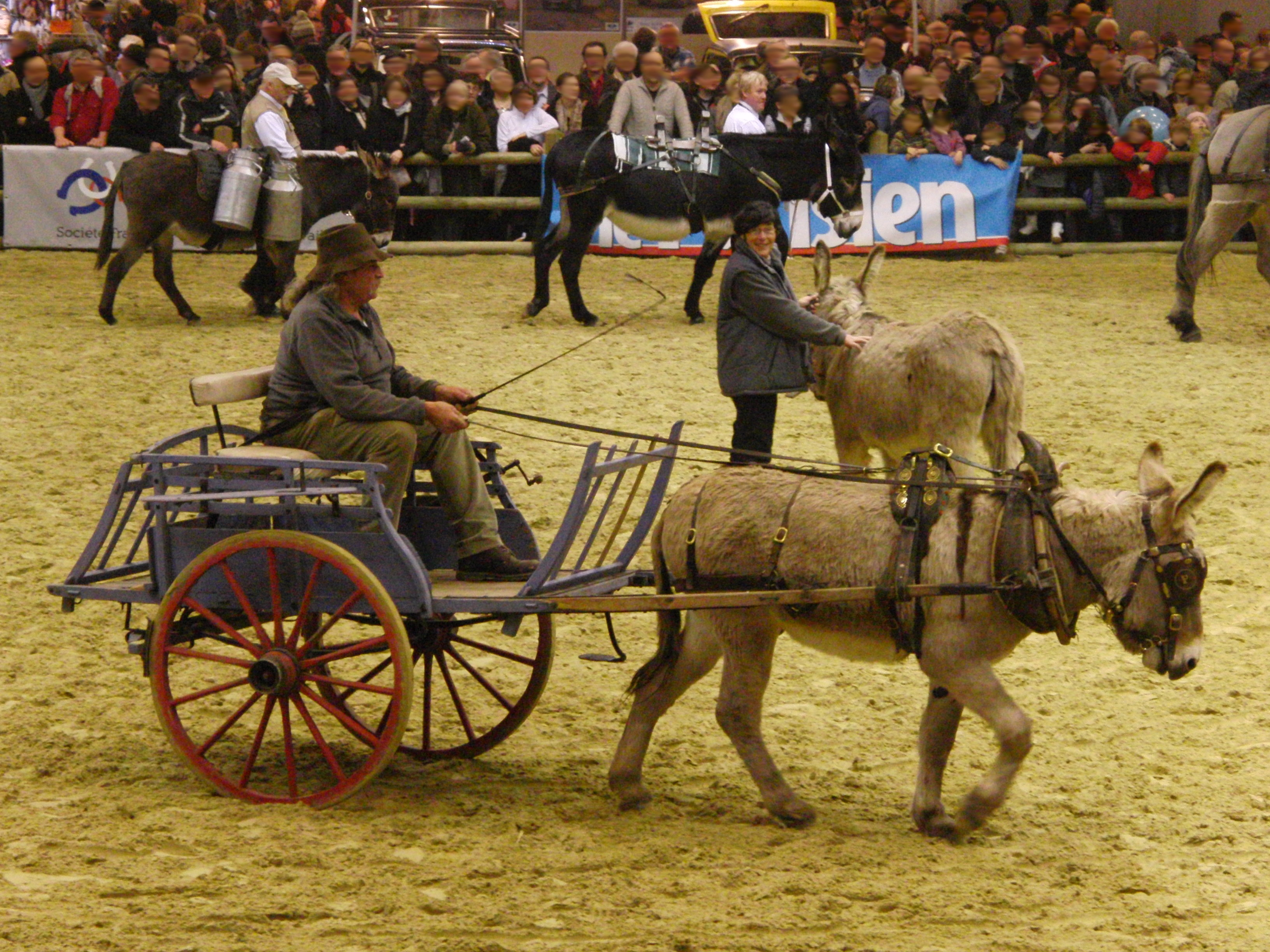 Rubens du Colombier, 8 ans, âne de provence, présenté attelé - Salon international de l'agriculture 2013, Paris, France